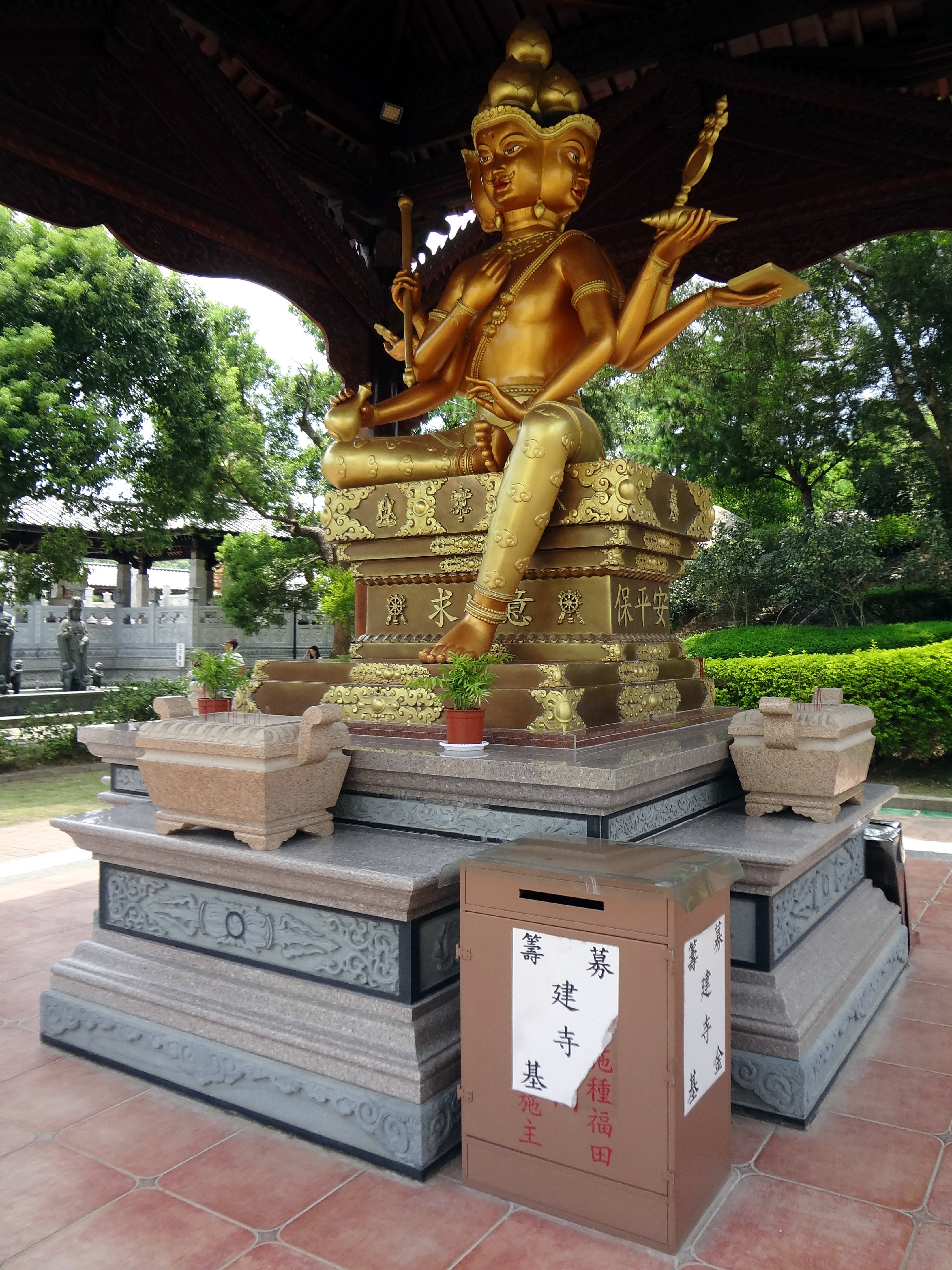 佛頂山朝聖寺三義道場四面佛，右前方設置建寺基金募款箱。